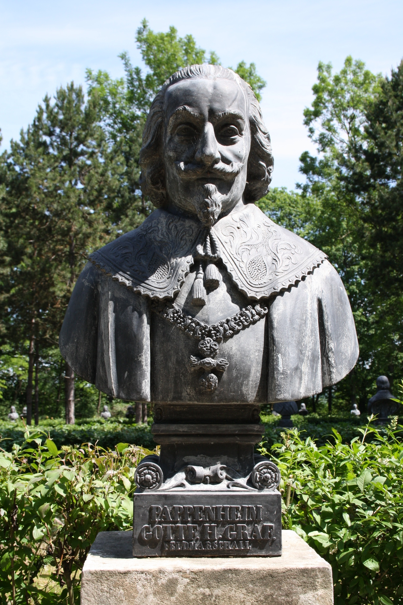 Büste in der Gedenkstätte Heldenberg (Niederösterreich)